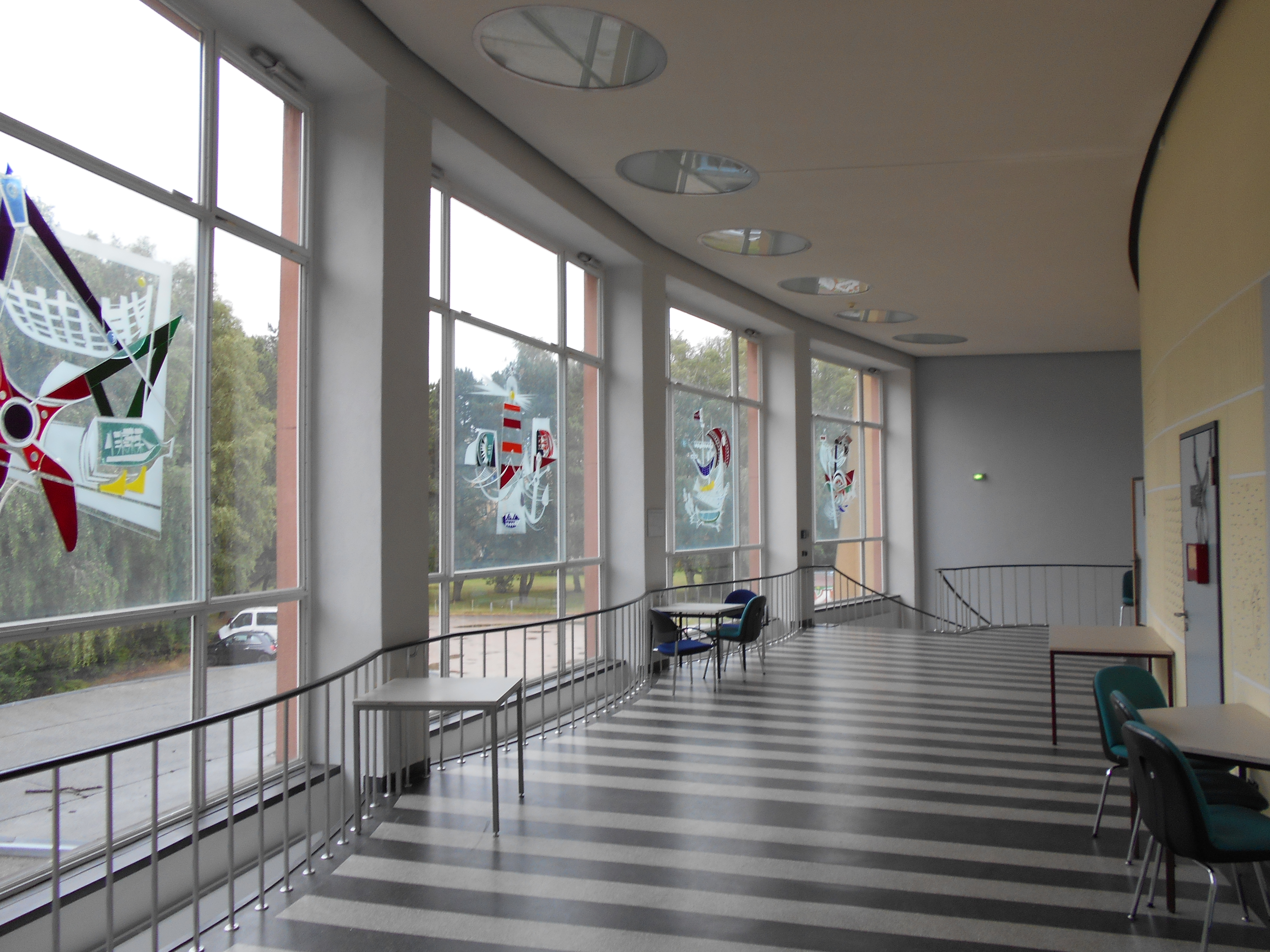 Blick ins Foyer des Großen Hörsaals der Schiffbautechnischen Fakultät Rostock